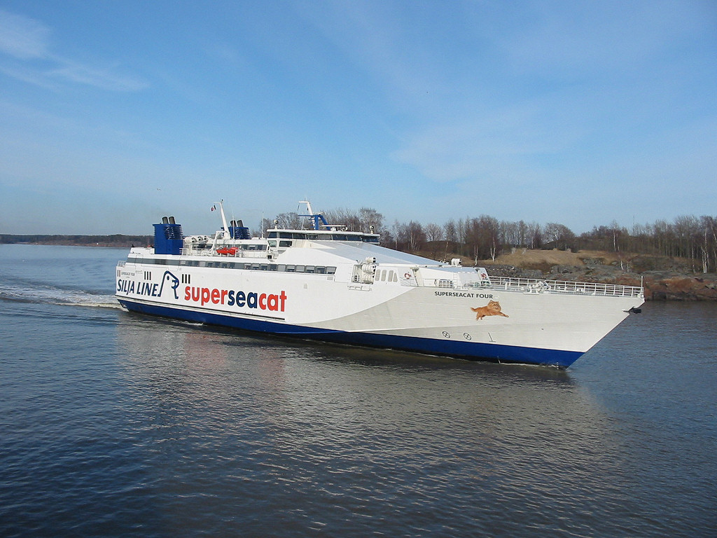 HSC SuperSeaCat Four at Kustaanmiekka strait. IMO Number: 9141883 MMSI Number: 247353000 Callsign: IBDU Length: 100 m Beam: 17 m